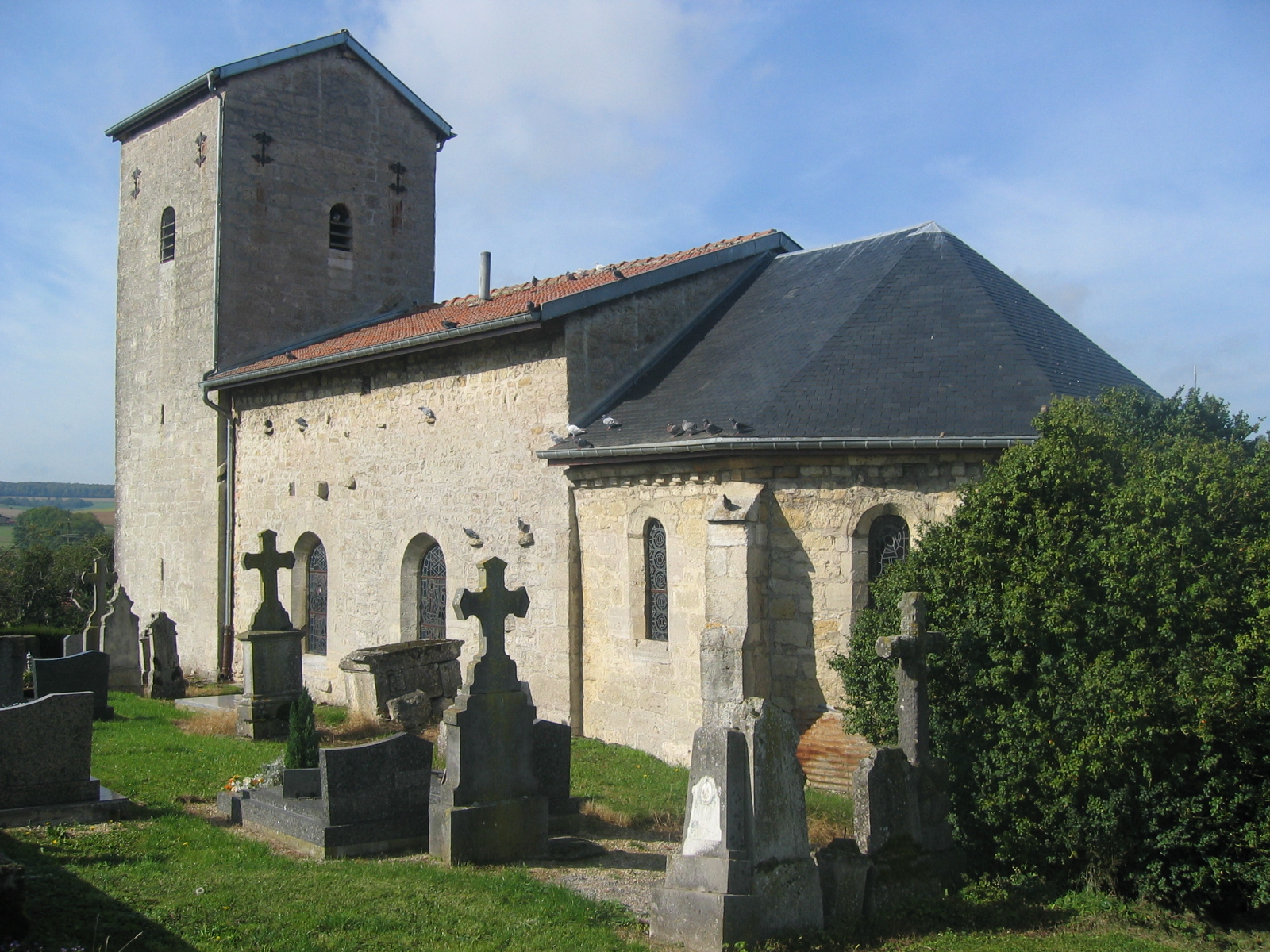 Eglise de Cléry-le-Petit